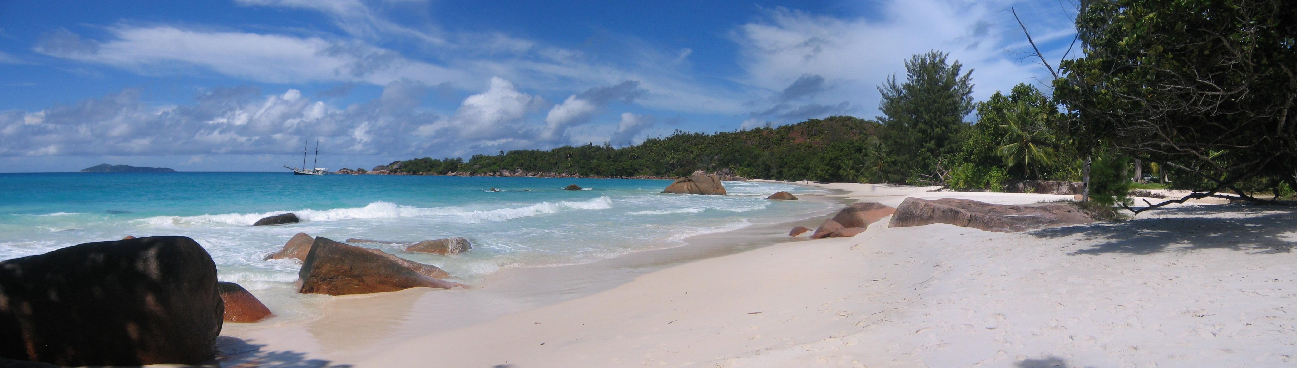 Anse Lazio